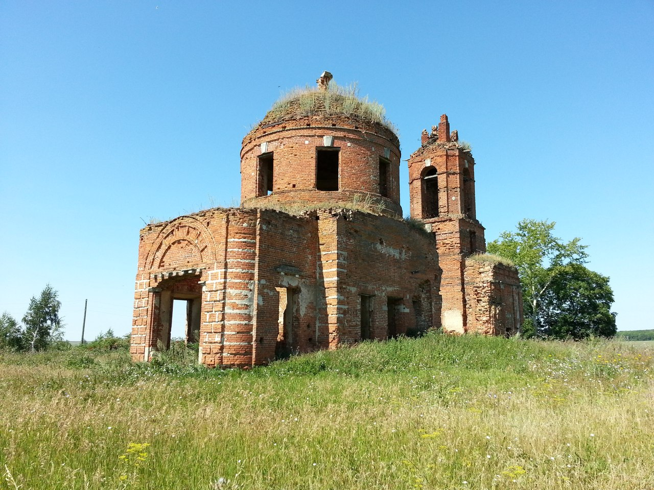 Архангельская церковь с Никольским приделом (Рязанская область, Михайлов, село Огибалово)